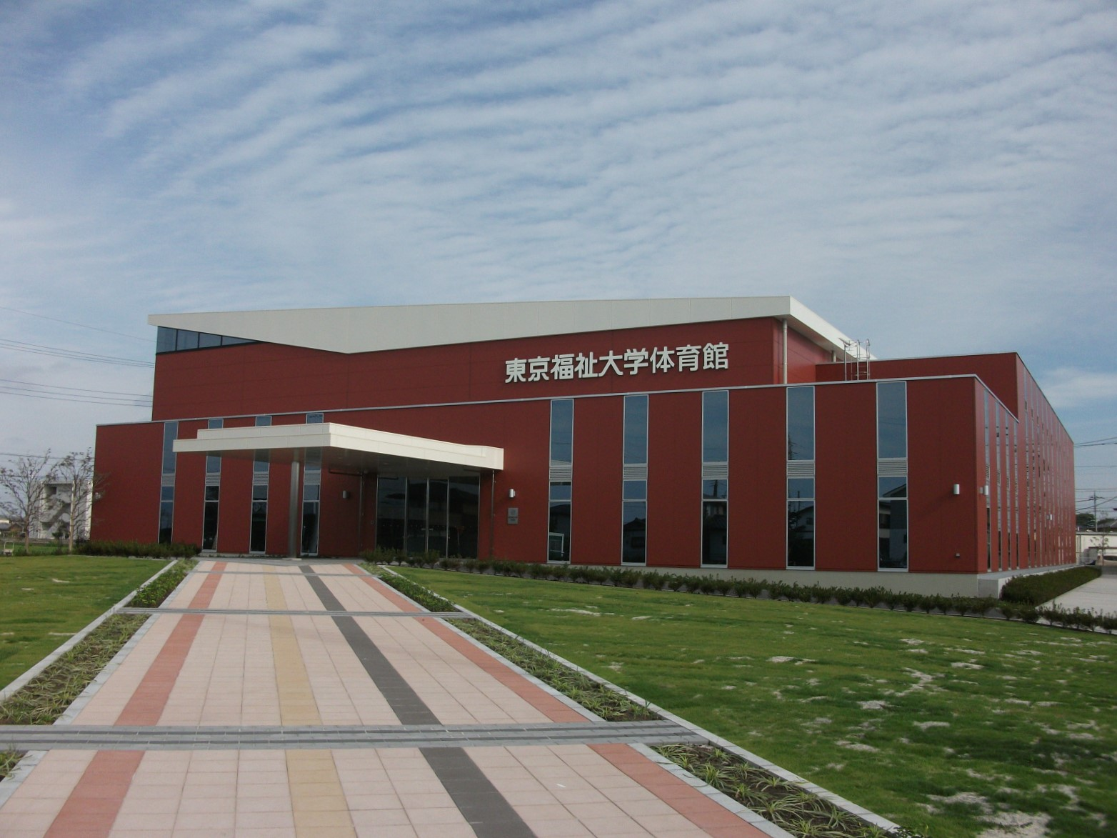 東京福祉大学 伊勢崎キャンパス体育館